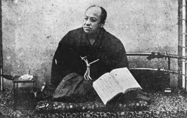 南部利剛（1827-1896）